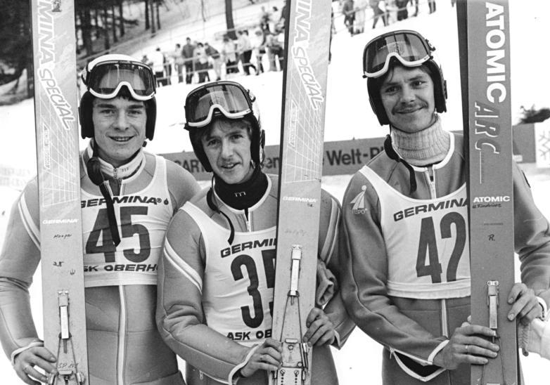 Title: Oberwiesenthal, H. Hunger, J. Weißflog, U. Findeisen People in the image: Weißflog, Jens: Skisportler, Sprunglauf, SC Traktor Oberwiesenthal, Olympiade 1984, Vaterländischer Verdienstorden (VVO) in Gold 1984, DDR Hunger, Heiko: Skiläufer, DDR Findeisen, Ulf: Skispringer, DDR Factual corrections and alternative descriptions are encouraged separately from the original description. Additionally errors can be reported at this page to inform the Bundesarchiv. Original historic description: ADN-ZB Thieme 31.1.89 Oberwiesentahl: 41. DDR-Skimeisterschaften In der ersten Meisterschaftsentscheidung sicherte sich Jens Weißflog (SC Traktor Oberwienthal, M.) den Titel im Spezialsprunglauf von der Normalschanze vor Heiko Hunger (SC Dynamo Klingenthal) und seinem Klubkameraden Ulf Findeisen.